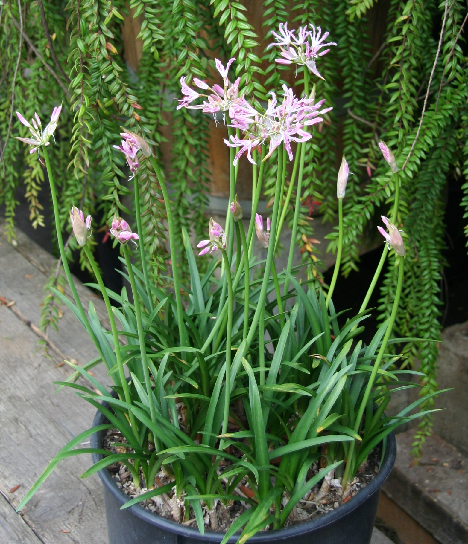 Nerine undulata im Botanischen Garten Dresden